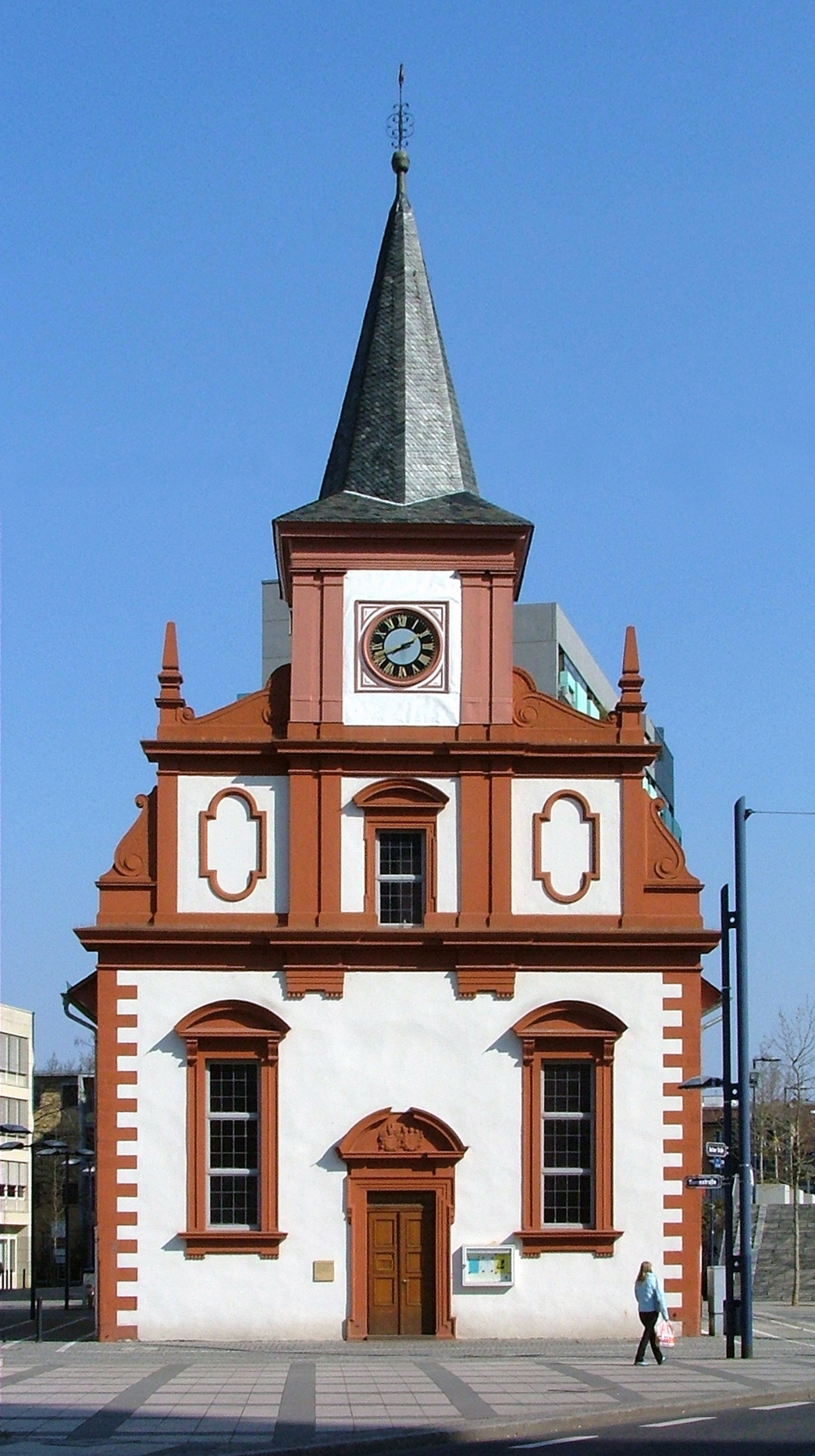 Französisch reformierte Kirche, Offenbach am Main